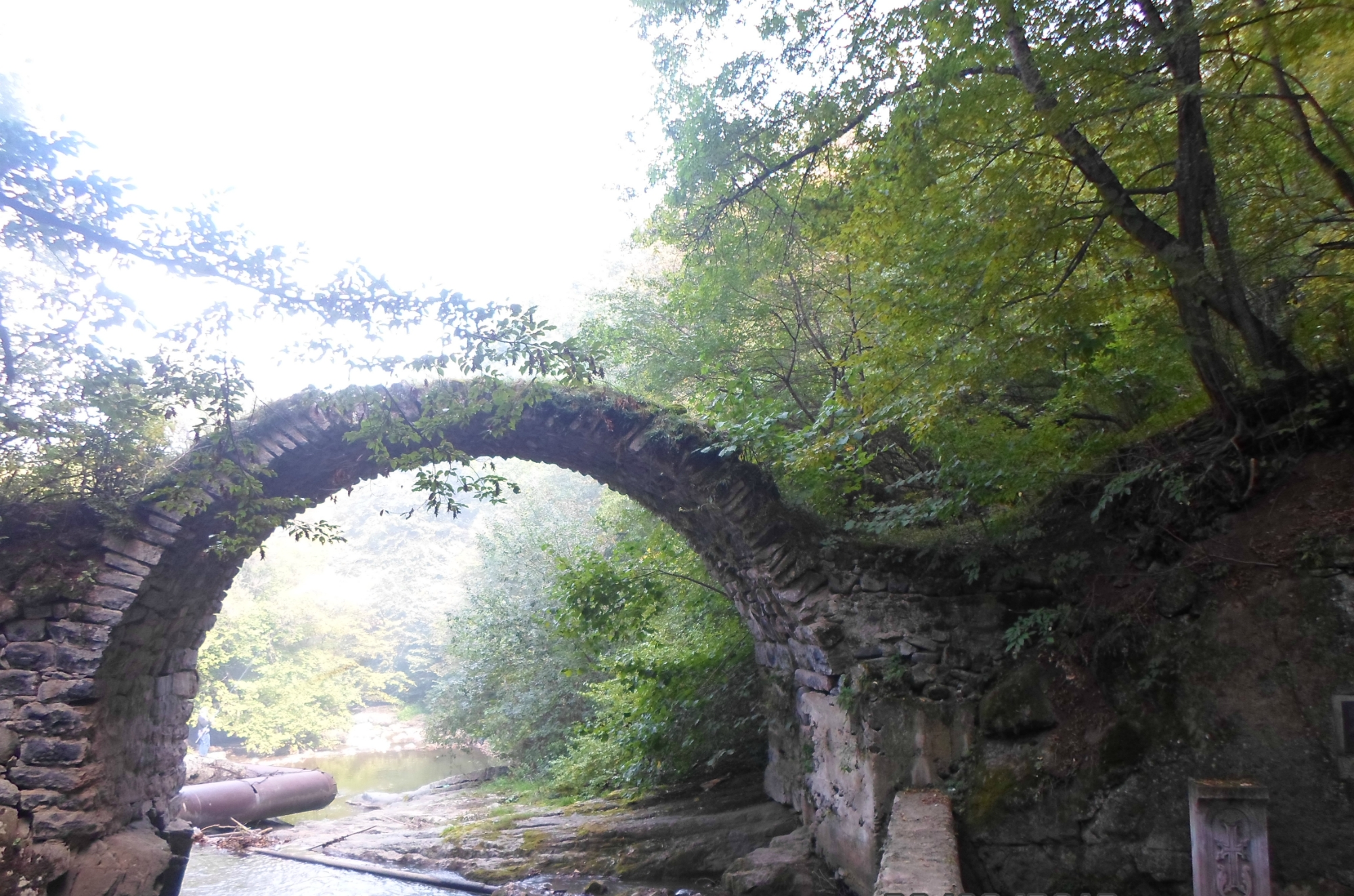 Татарча/tatarça: Գտնվում է Տավուշի մարզի Աճարկուտ գյուղից հարավ՝Կիրանց գետի վրա։13-14 դդ. միաթռիչք կամուրջ է։ 8/6.9